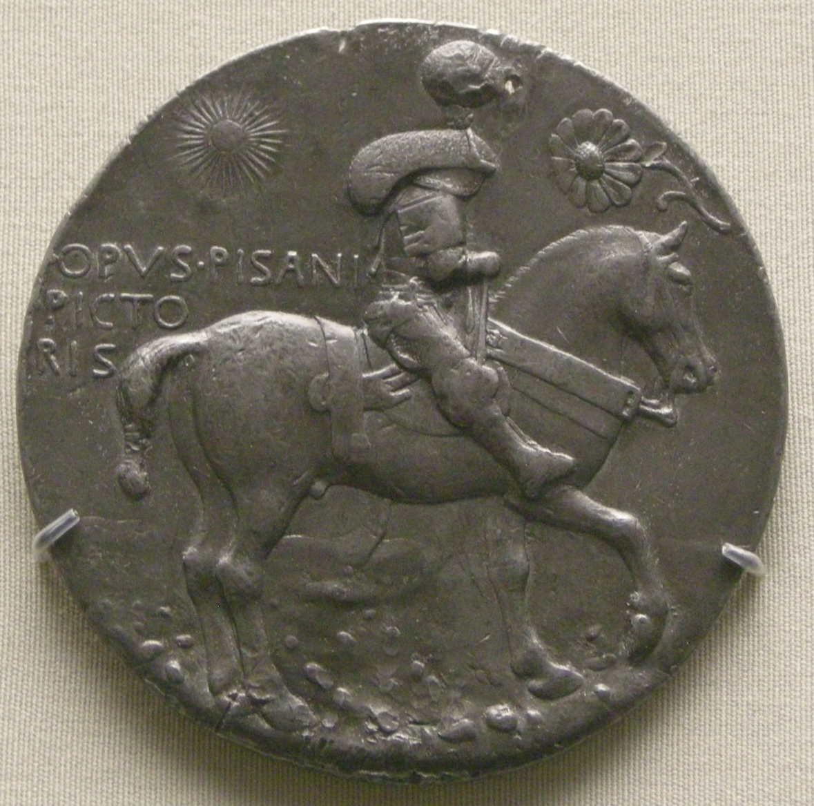 Pisanello, medaglia di ludovico gonzaga (verso)